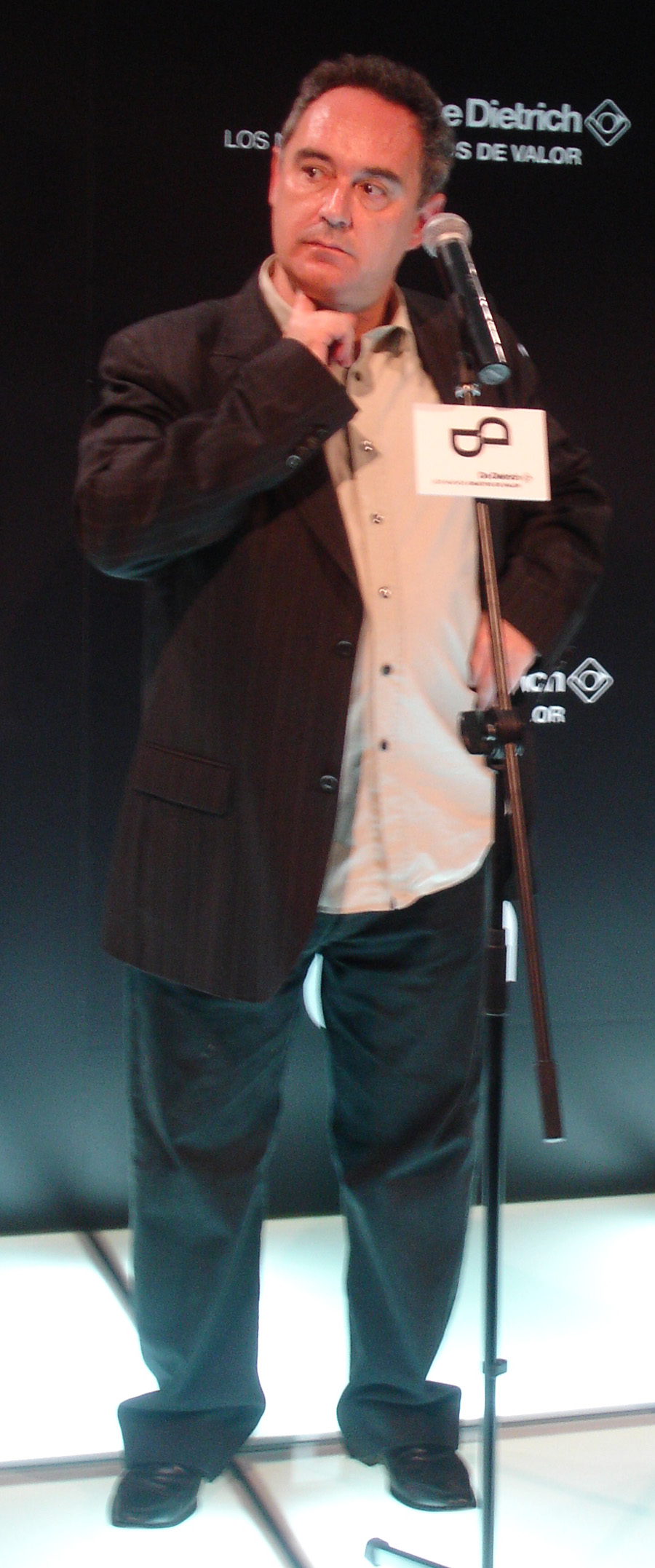 Ferran Adrià. Spanish chef in "De Dietrich" presentation.